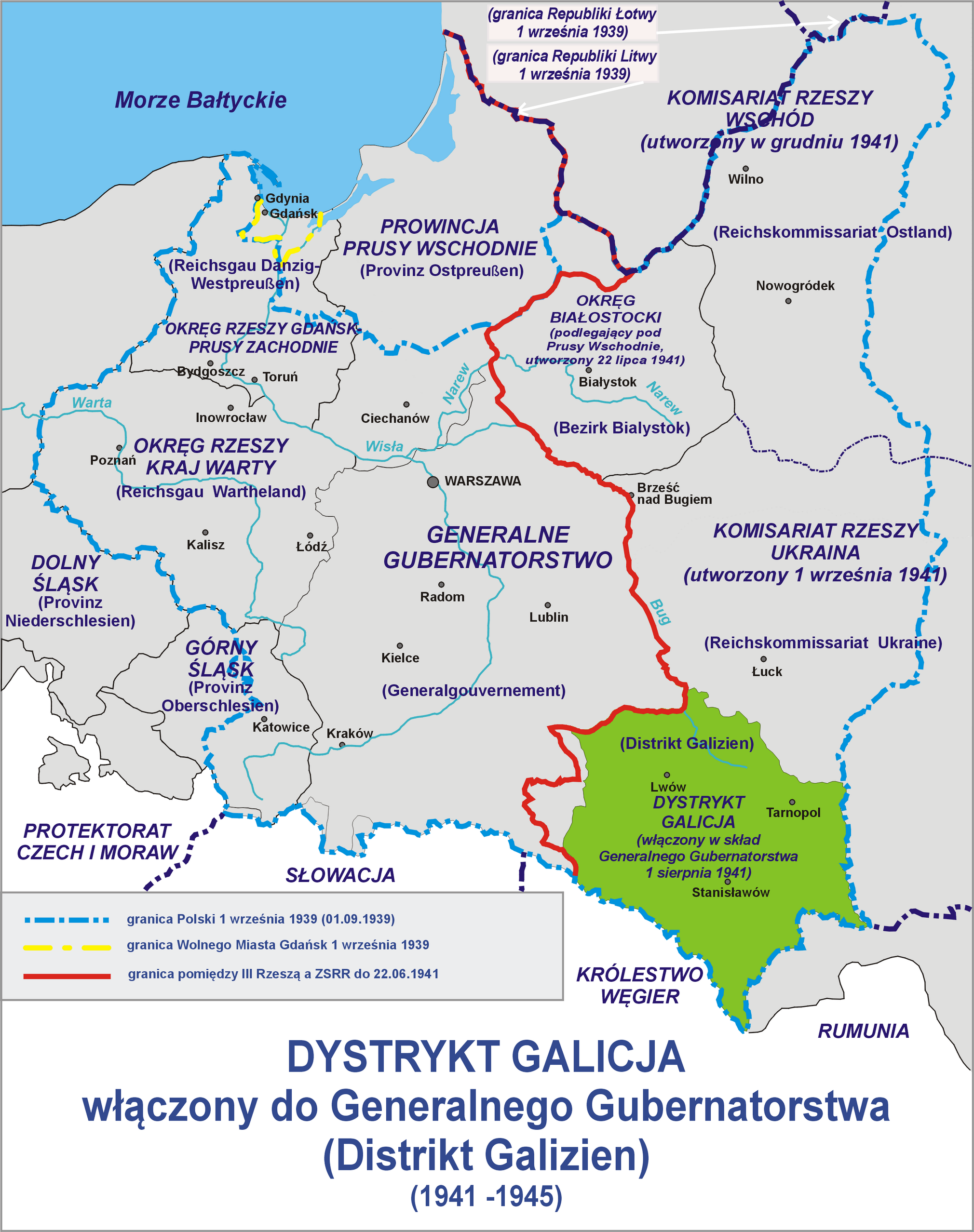 Dystrykt Galicja (Distrikt Galizien) 1941 - 1945